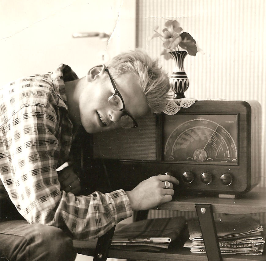 Fritz Moen "listen" to radio.